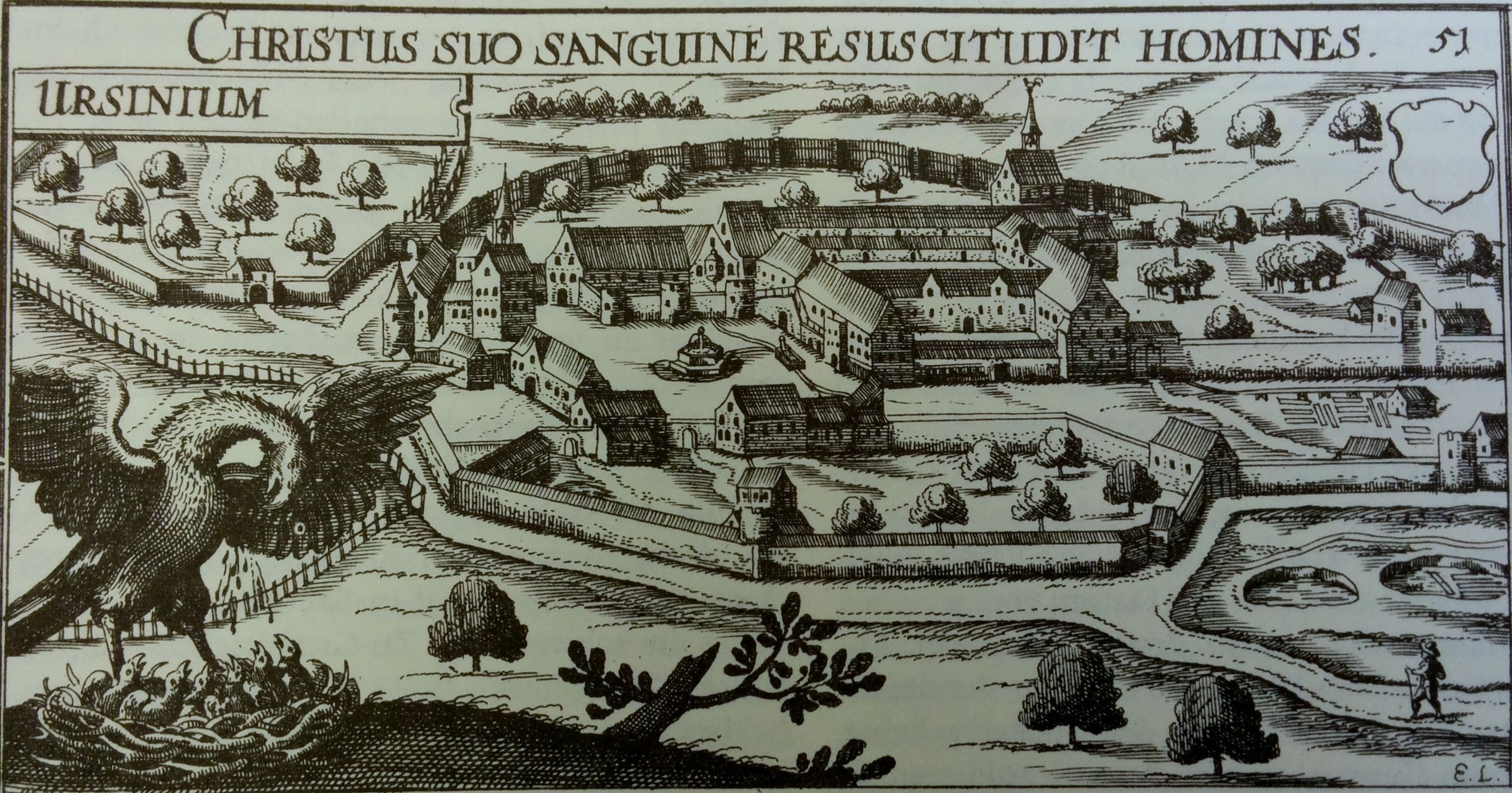 Kloster Irsee (Ursinium); Ansicht des Stifts aus der Klösterbeschreibung von Daniel Meisner in "Politisches Schatzkästlein (Thesaurus Philopoliticus)", Frankfurt, 1627 nach einem Stich des gleichen Motivs von Pater Carl Stengel